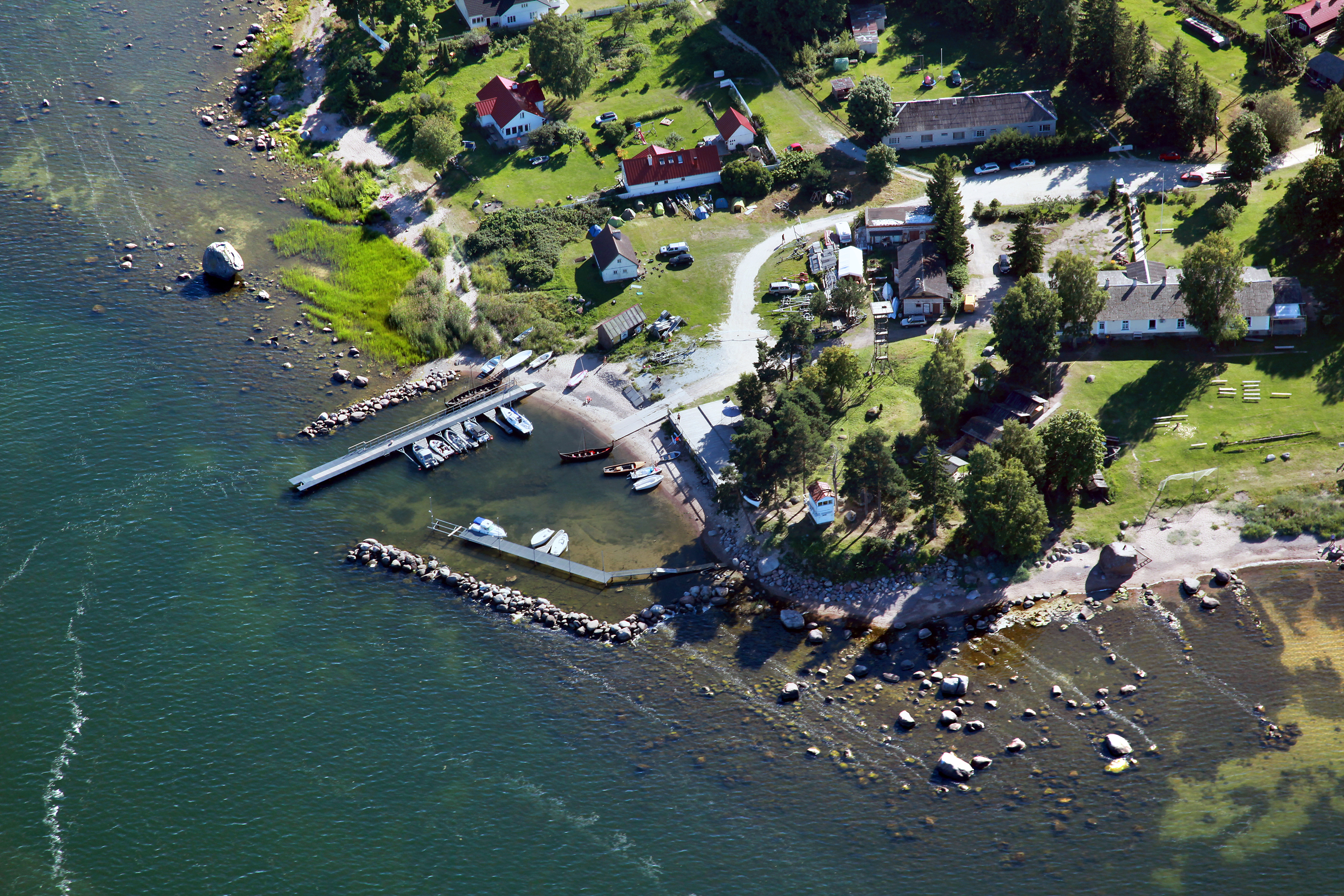 Käsmu sadam ja kultuurimälestiseks arvatud Käsmu tuletorn.